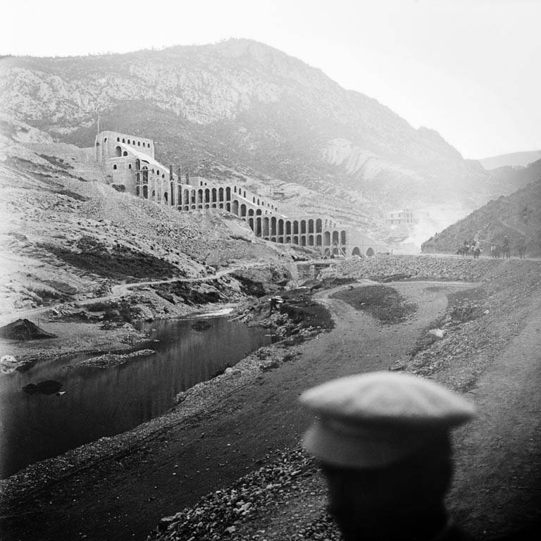 La fàbrica de ciment Asland del Clot del Moro. Cèsar August Torras i Ferreri (ca. 1905)